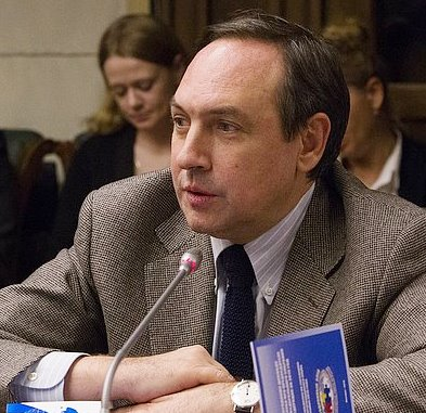 Вячеслав Алексеевич Никонов (род. 1956) — российский историк, политолог